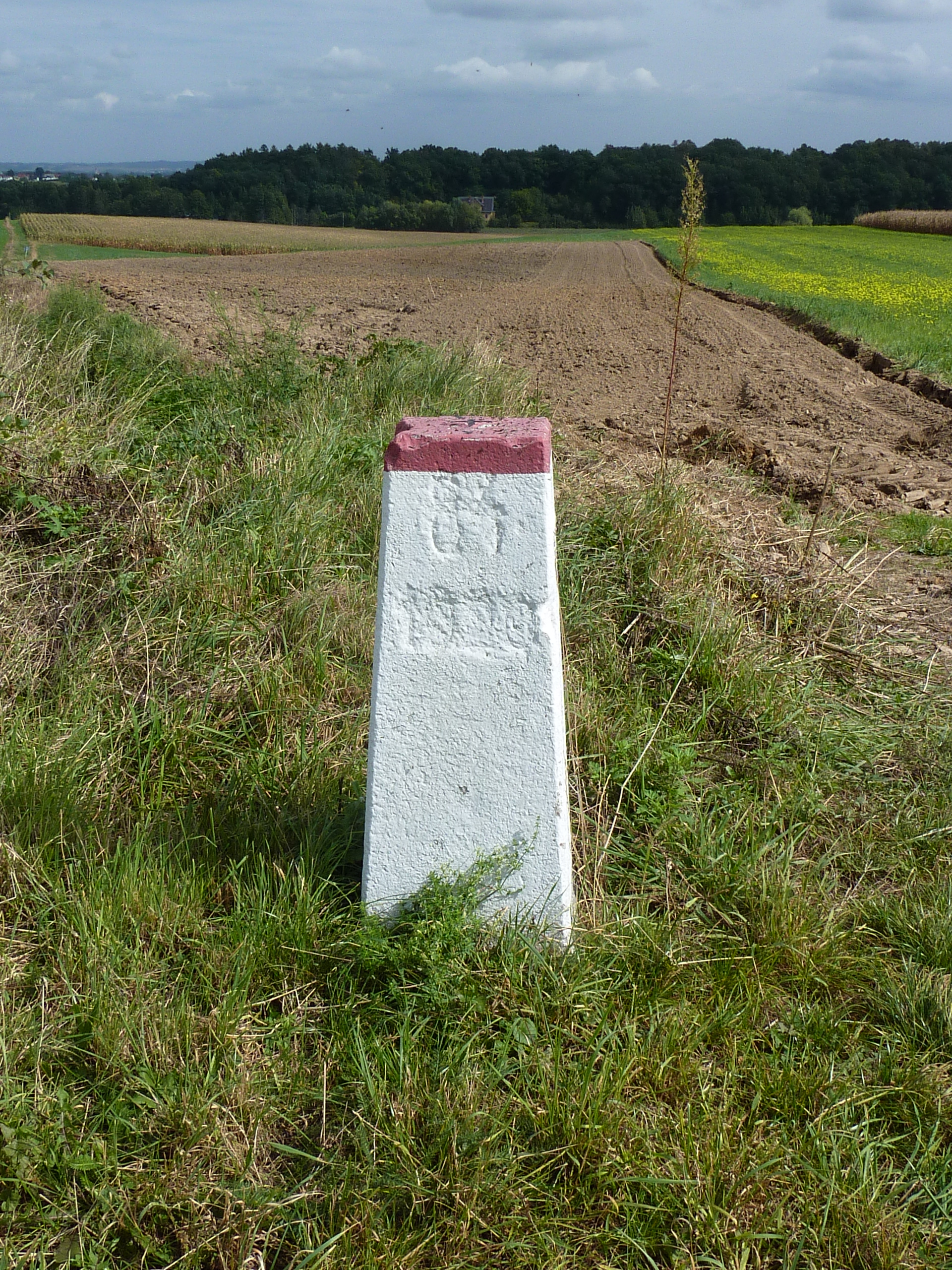 Chuchelná, hraniční kámen při hraničním přechodu do Polska, nesoucí letopočet 1920 (připojení Hlučínska k Československu)